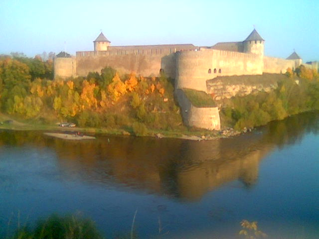 Ciudad Ivangorod en Rusia